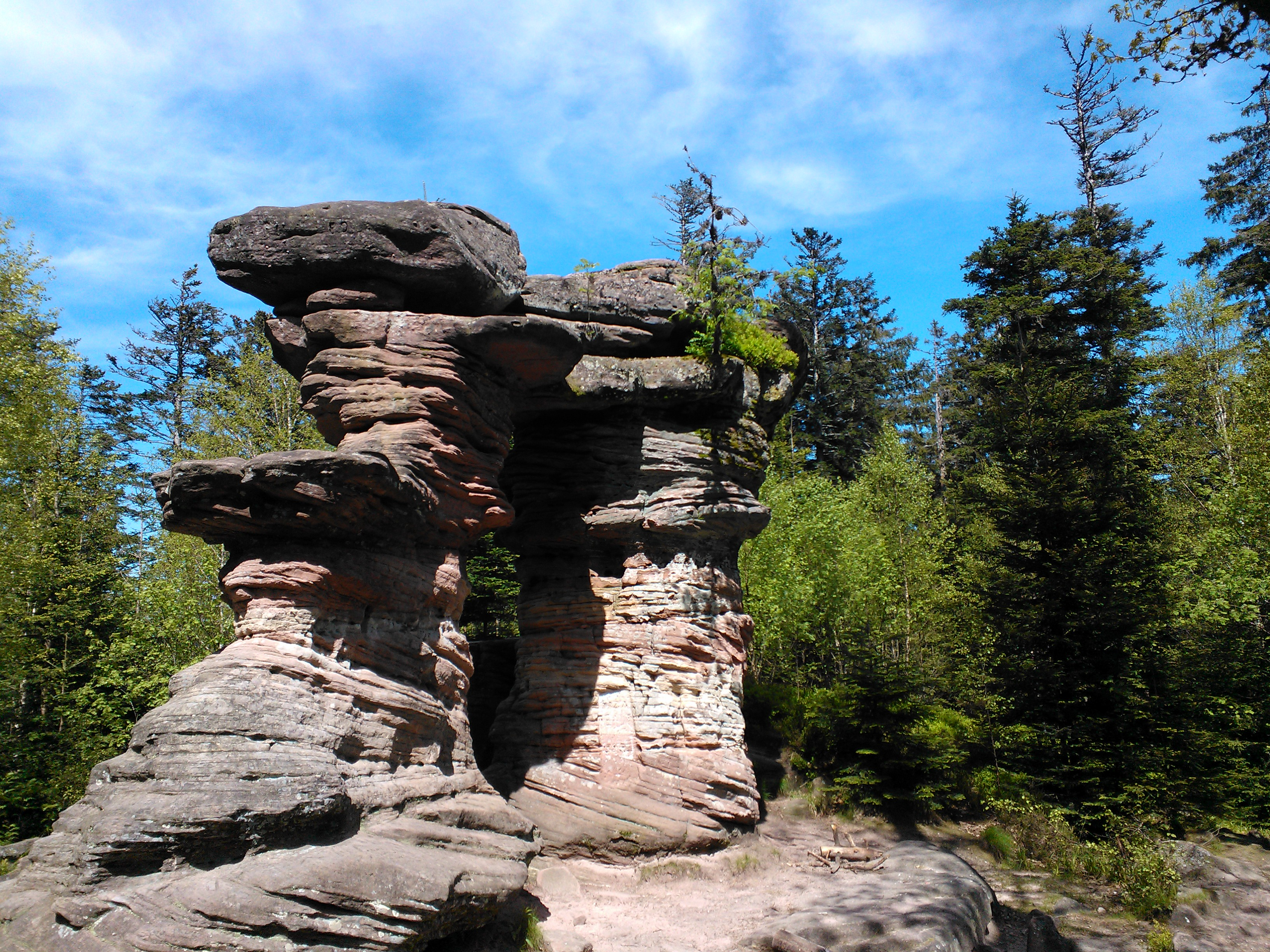 Porte de Pierre, Vosges, 02/06/2013.